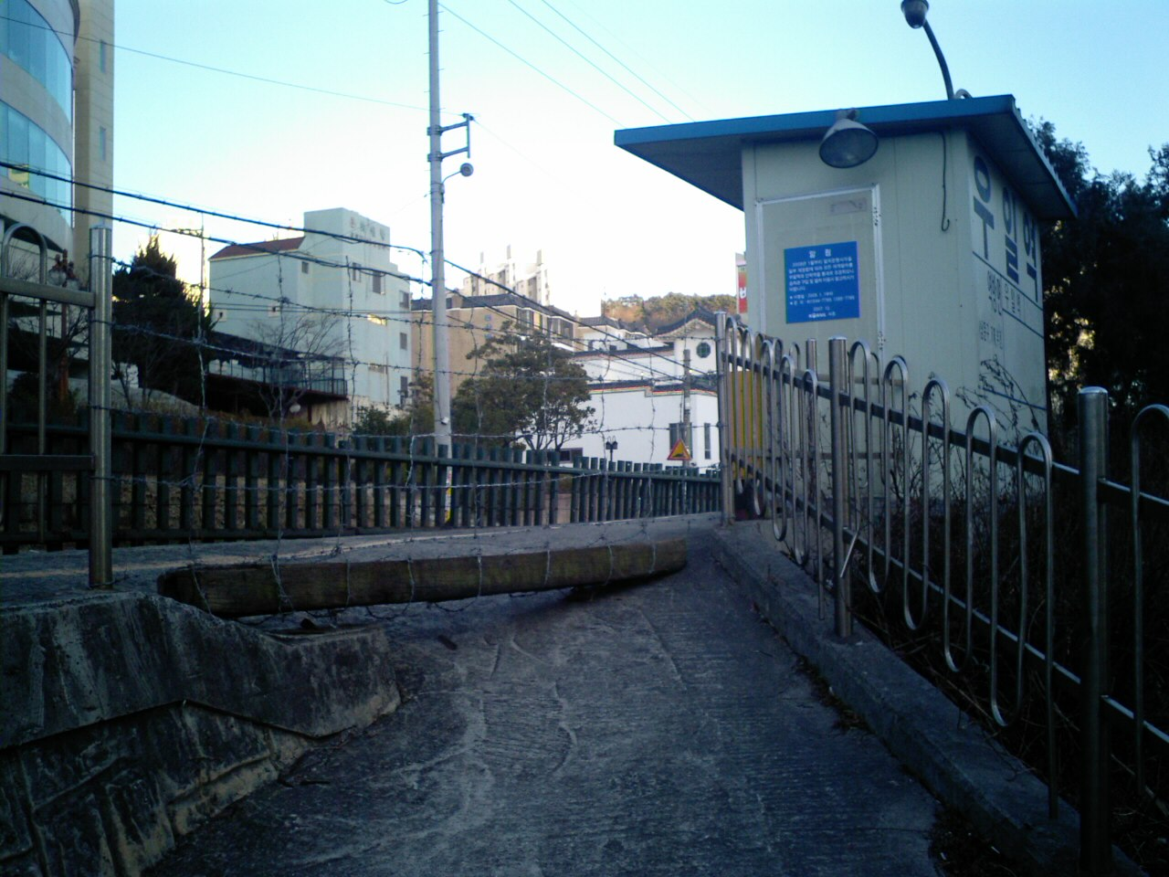 동해남부선 우일역 출입구